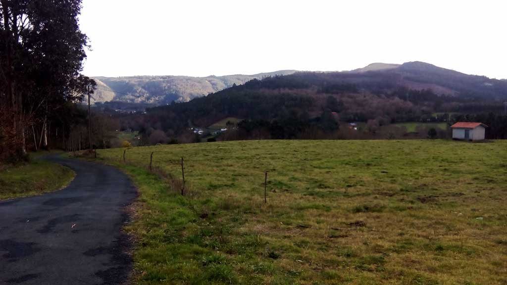 Vista Alegre, Doso, Narón.